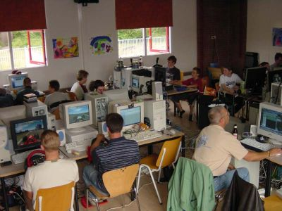 Lanparty